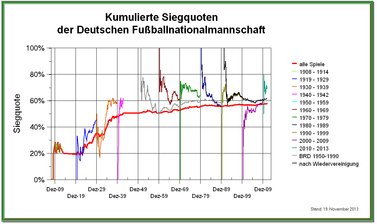 Kumulierte Siegquote der Deutschen Nationalmannschaft